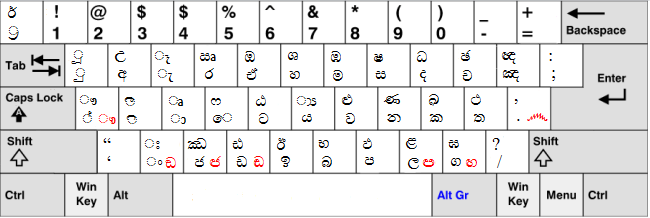 Windowsのシンハラ語キーボード